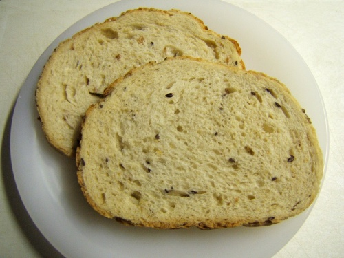 Speltbrood